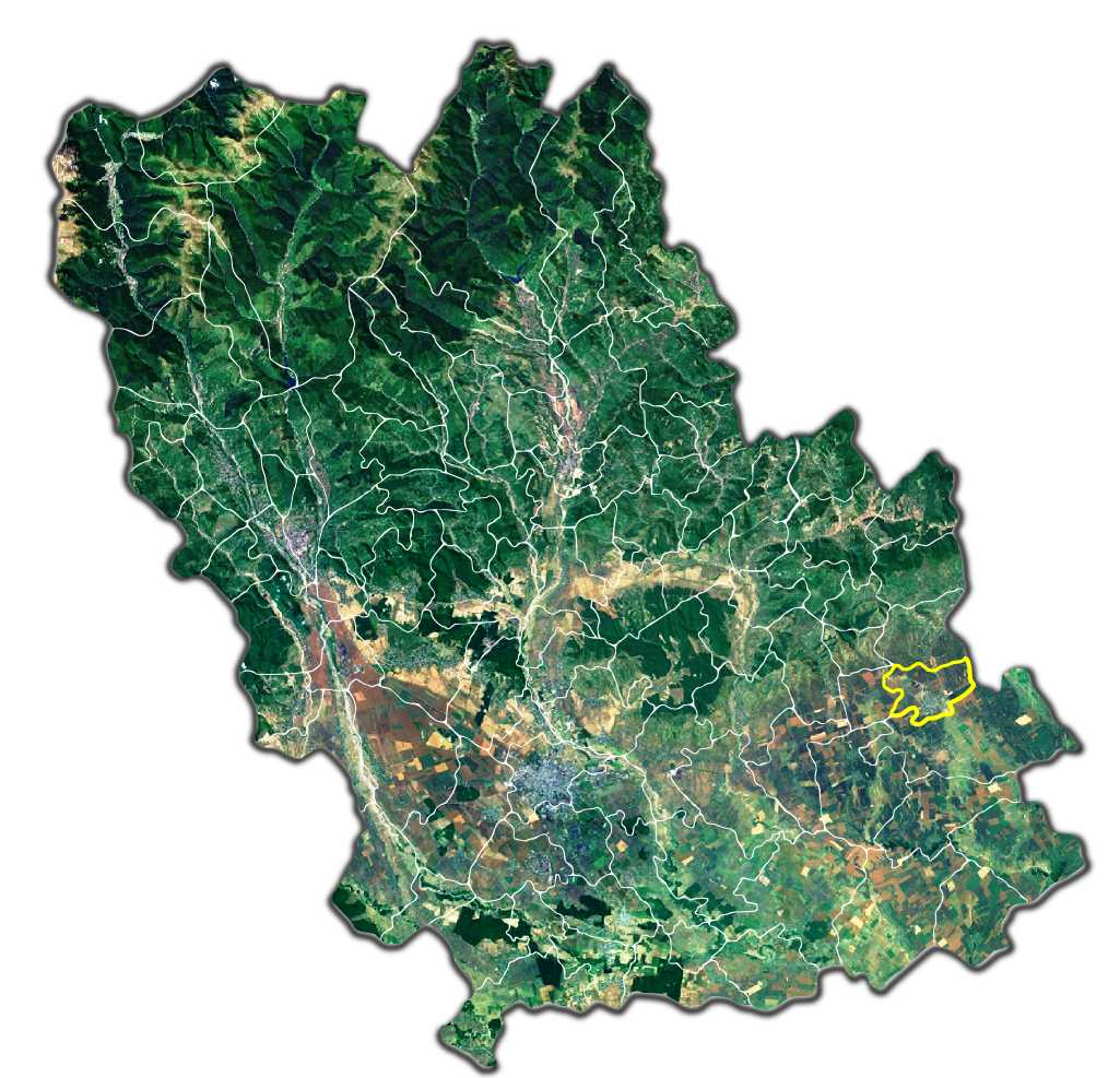 Mizil jud Prahova.